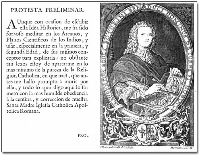 Retrato de Lorenzo Boturini, historiador de la Nueva España